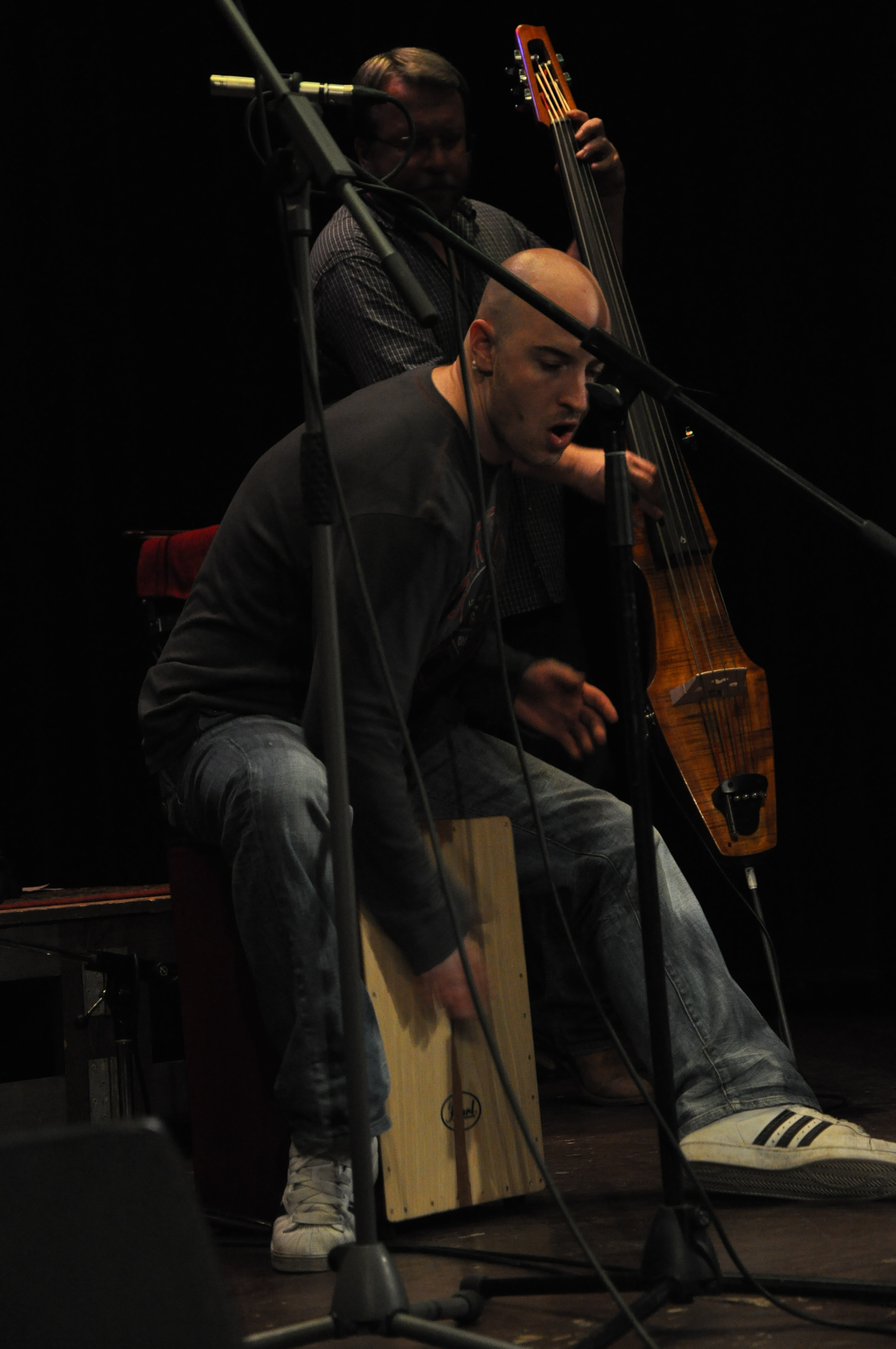 David Landštof a Petr Surý na dvojkoncertě Garcia a Druhá tráva v Hradci Králové 18. dubna 2009.